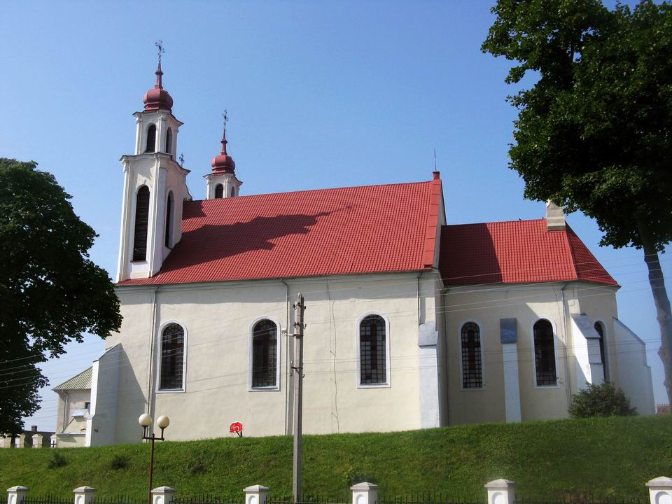 Беларуская (тарашкевіца): Касьцёл Сьвятых Апосталаў Пятра і Паўла ў Іўі